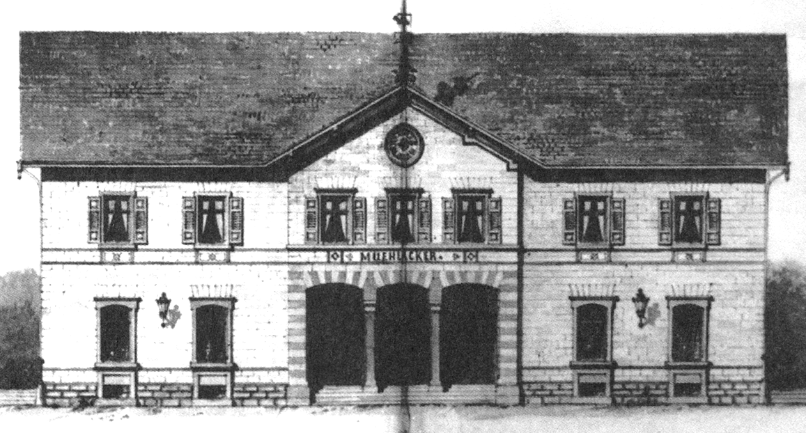 Württembergischer Bahnhof in Mühlacker, Aufriss der Stadtseite.